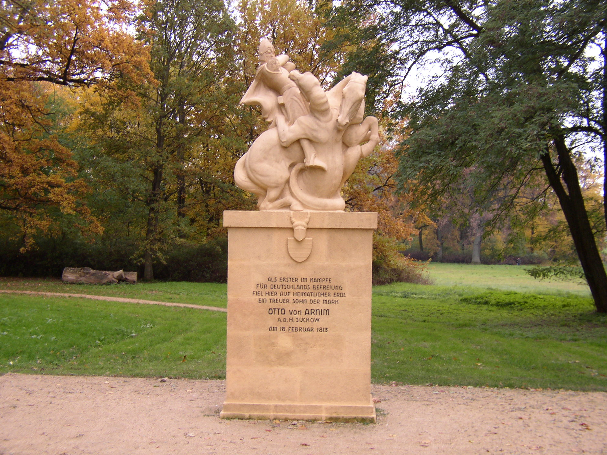 Denkmal zur Erinnerung an einen gefallenen preußischen Offizier (Otto von Arnim-Suckow (1787?–1813), Leutnant in russischen Diensten, gefallen bei Blumberg im Befreiungskrieg 1813) am Ortseingang von Blumberg/Lk. Barnim - Lennépark (neu errichtet 2010)